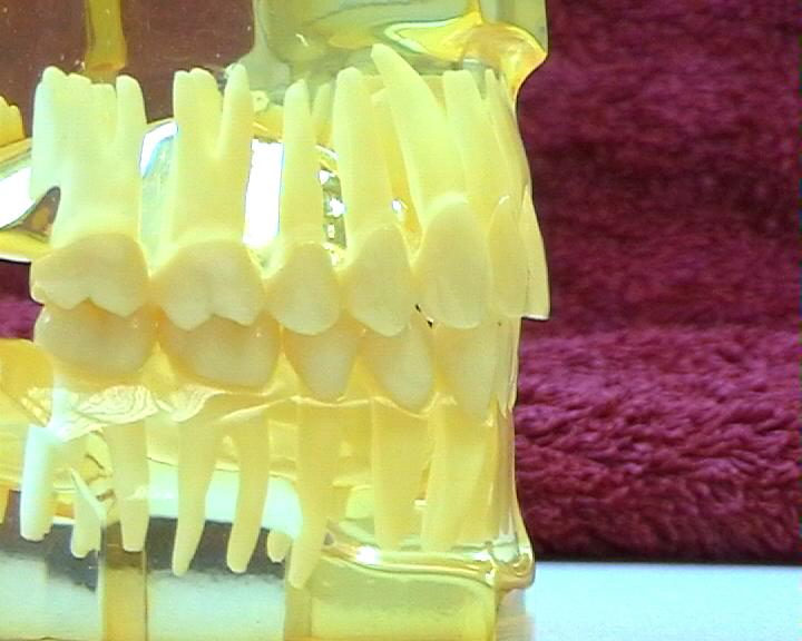 Oberkiefer/Unterkiefer im Zahnschluß; der obere Eckzahn liegt etwas distal (nach hinten) vom unteren Eckzahn (weil der 1. Ok-Schneidezahn größer ist als der 1. UK-Schneidezahn)